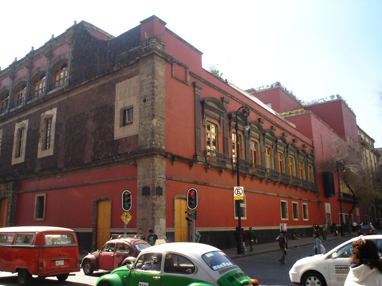 Officinas centrales de la Associacion de Bancos de Mexico